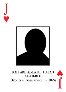 Рафи аль-Тикрити на карте